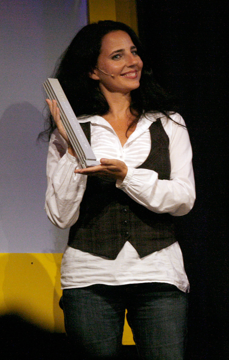 Nadja Maleh bei der Verleihung des Österreichischen Kabarettpreises 2010 im Vindobona in Wien.